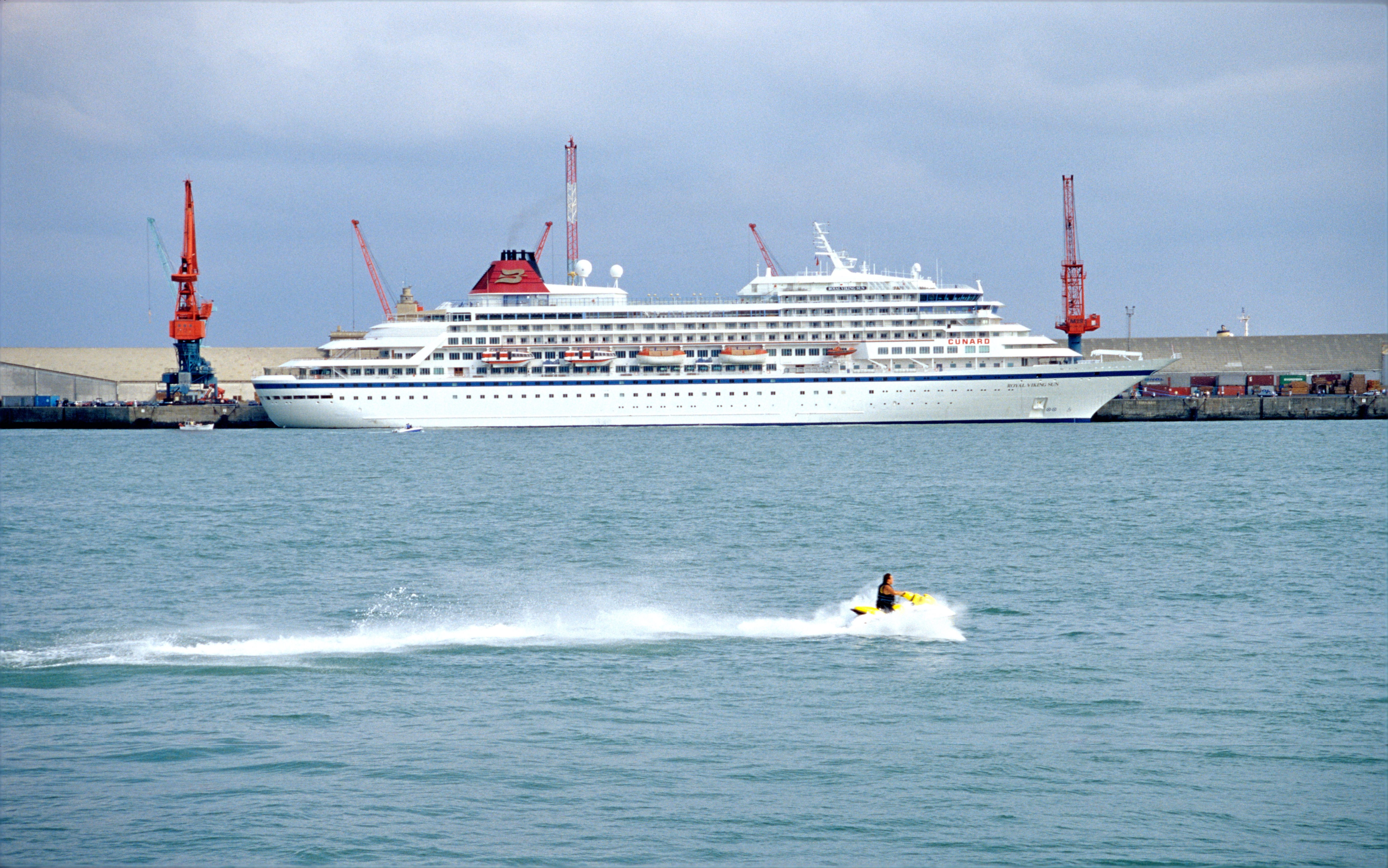 Le paquebot de croisière "Royal Viking Sun" en escale au môle d'escale du port de commerce de La Rochelle-Pallice. La Rochelle, Charente Maritime, France. Ce paquebot a changé de nom deux fois. Il s'appelle "Prinsendam" depuis 2002. Il mesure 204 mètres de long, 29 de large et peut transporter jusqu'à 850 passagers. Année et lieu de lancement: 1988 à Turku en Finlande.